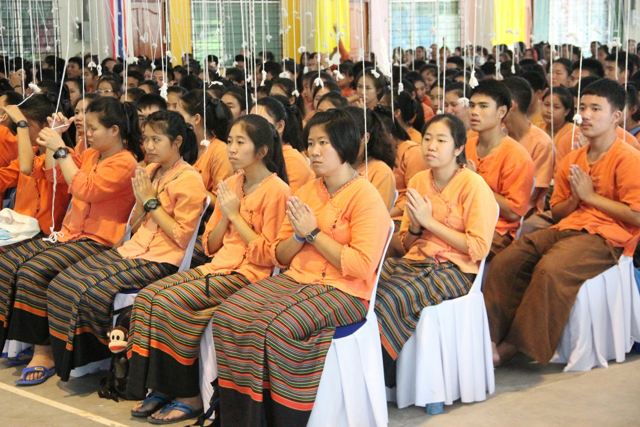 สถาปนา ส.ว.57